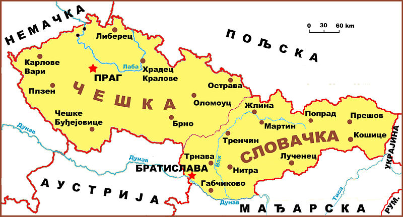 Аутор: Саша Костић Чехословачка мапа Licensing